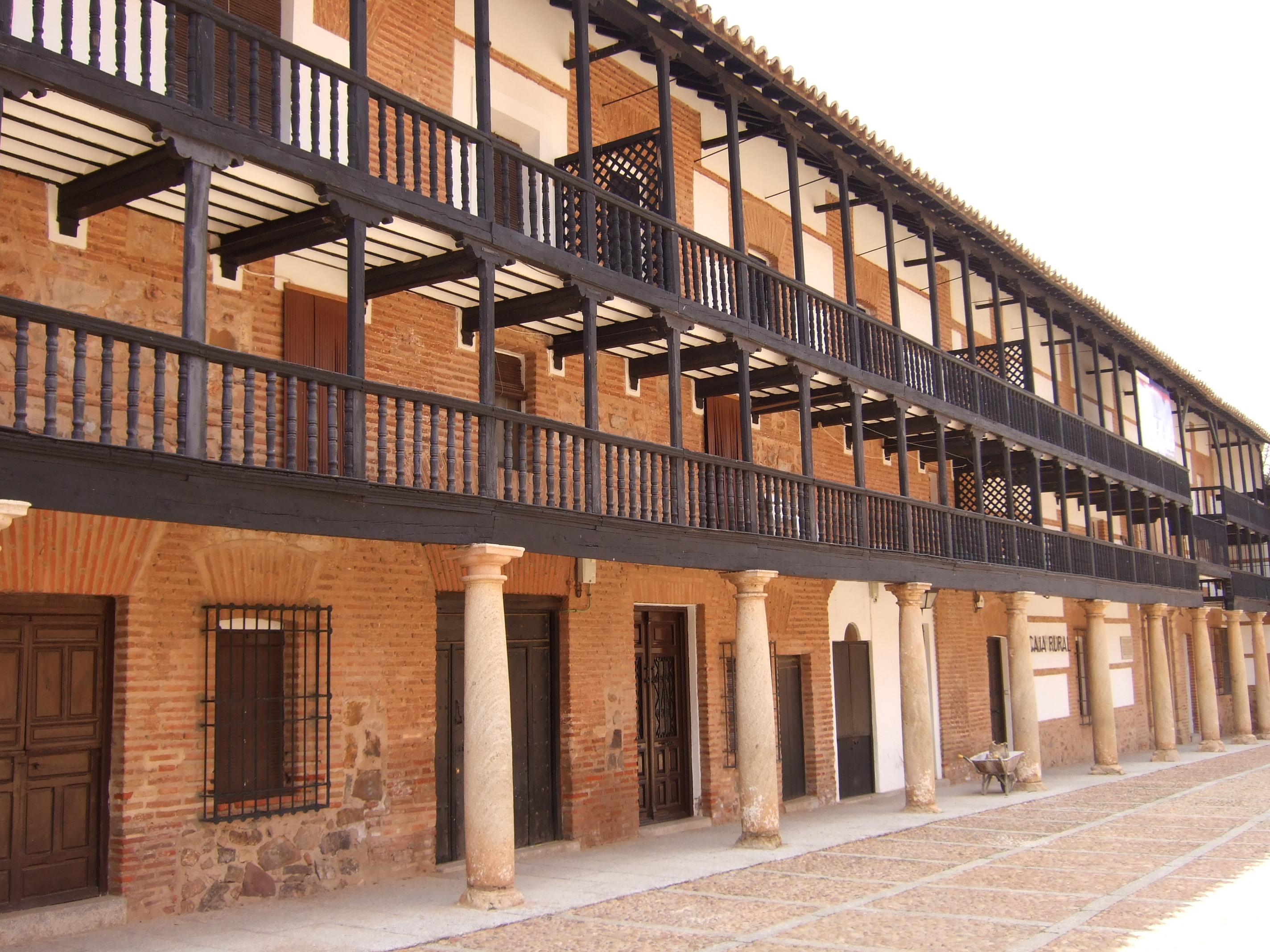 San Carlos del Valle, Espana.